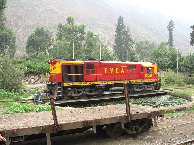 A girar / Durante la primera parte del trayecto del tren la dirección es en reversa; luego la locomotora pasa adelante por el resto del trayecto.